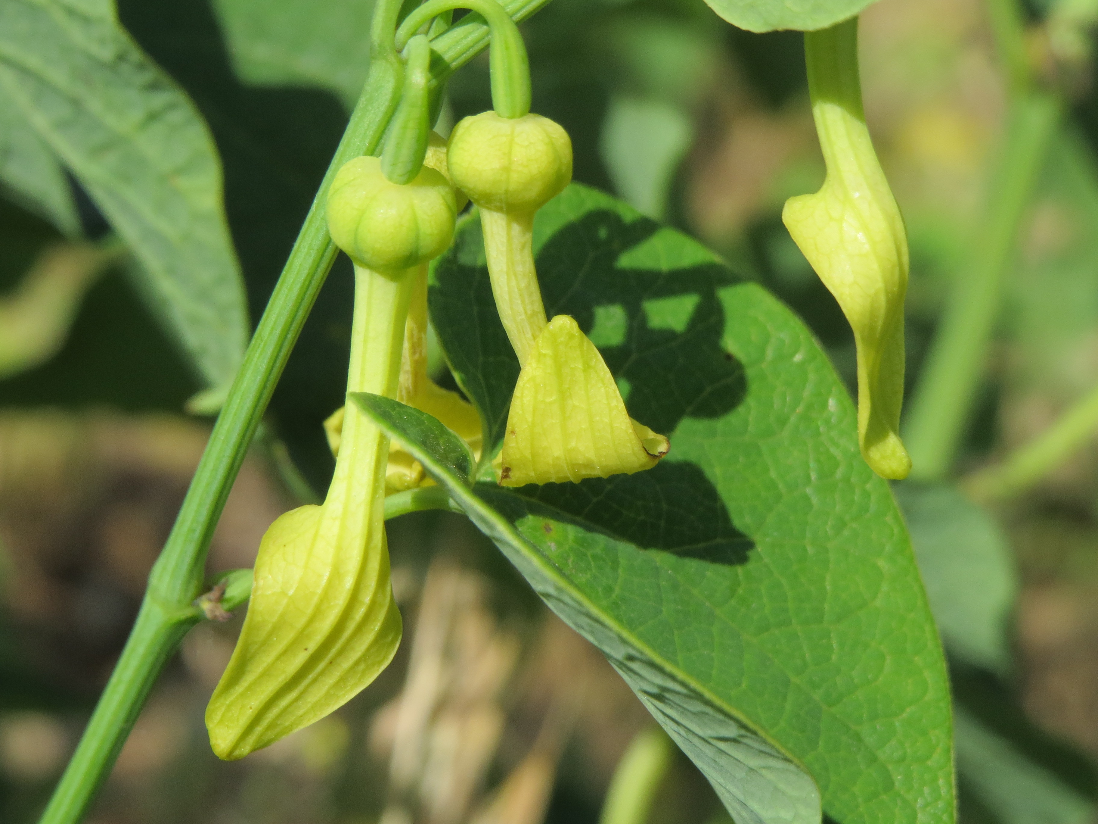 Die Osterluzei (Aristolochia clematitis) auf der Friedenshöhe (Naturschutzgebiet Oftersheimer Dünen) zeugt vom früheren Weinbau auf den Oftersheimer Dünen